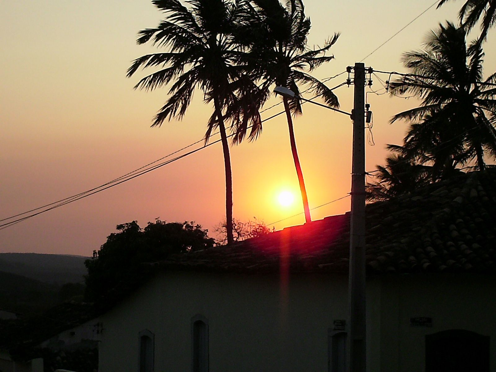 Sunrise in Caetité